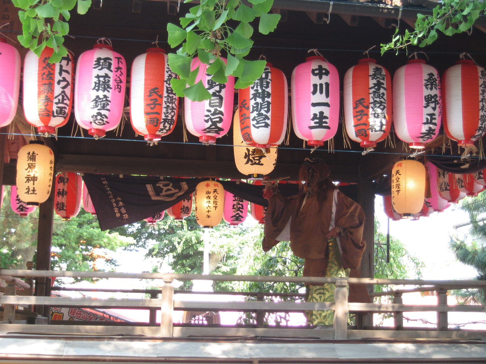 新潟市中央区。蒲原まつりの太々神楽奉納の様子。